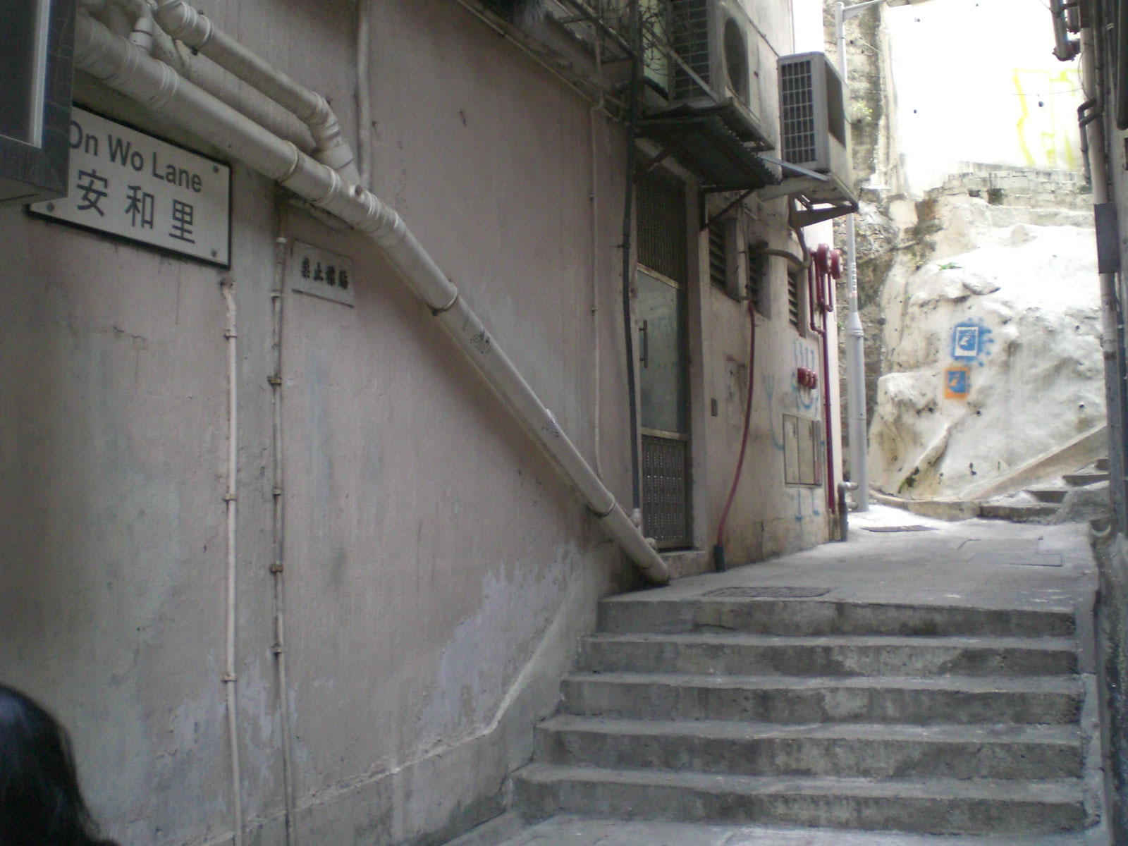 安和里 On Wo Lane, Sheung Wan, Hong Kong.